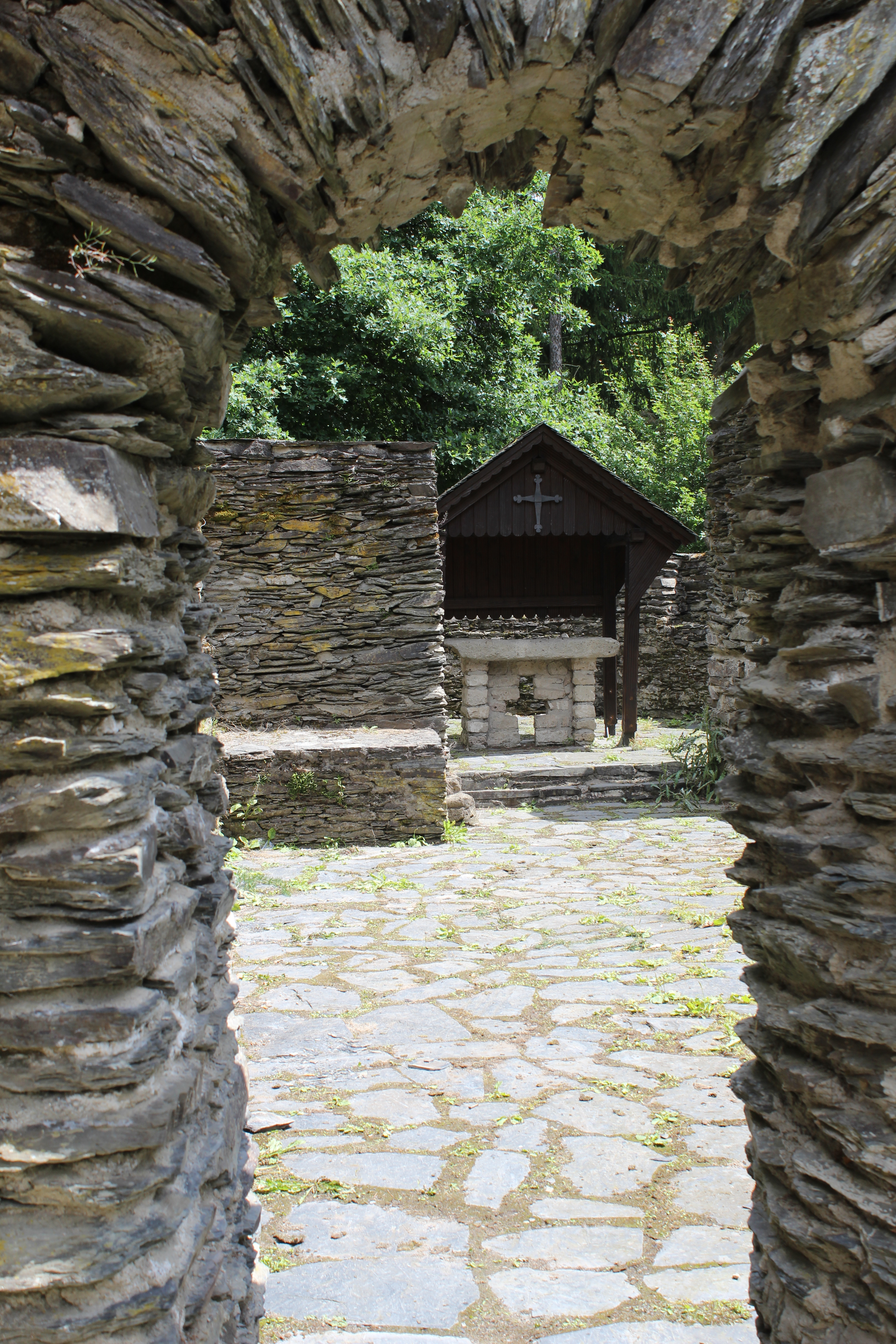 Detailfoto Mädburg bei Kehrig (MYK)